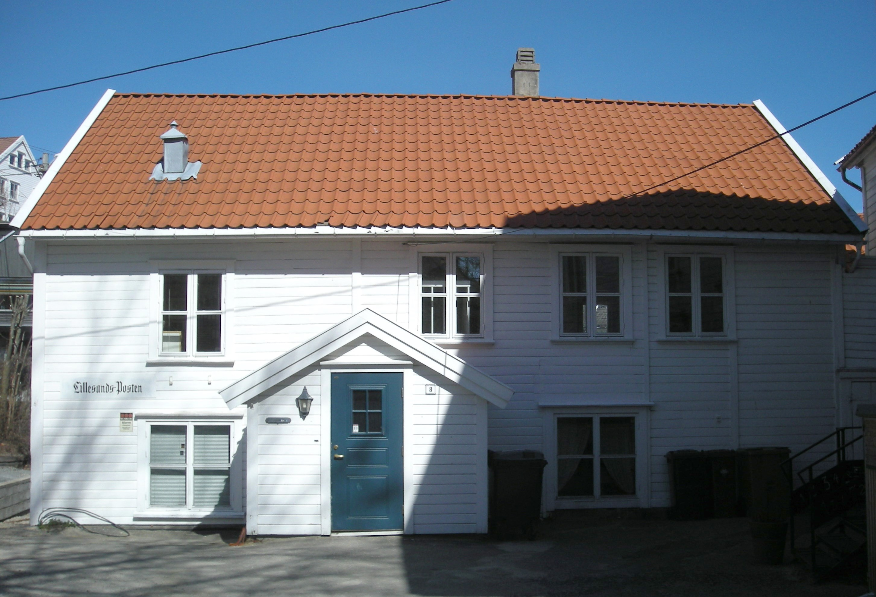 Lillesands-Postens lokale i Lillesand